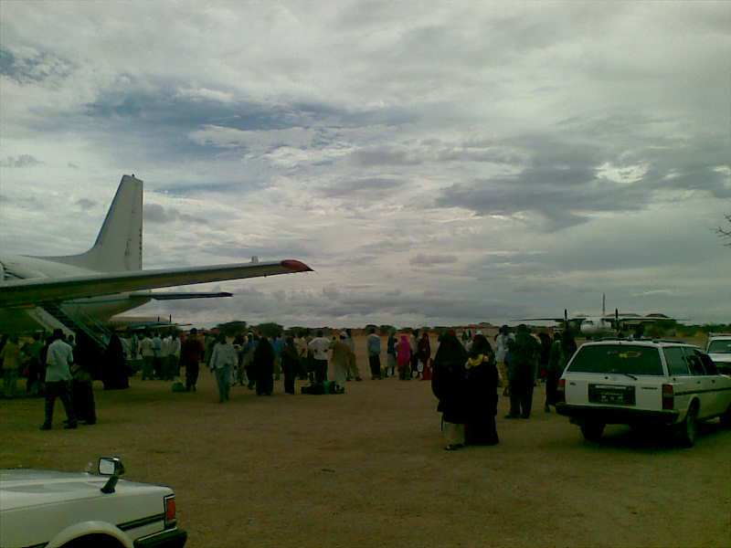 Galkaio Airport